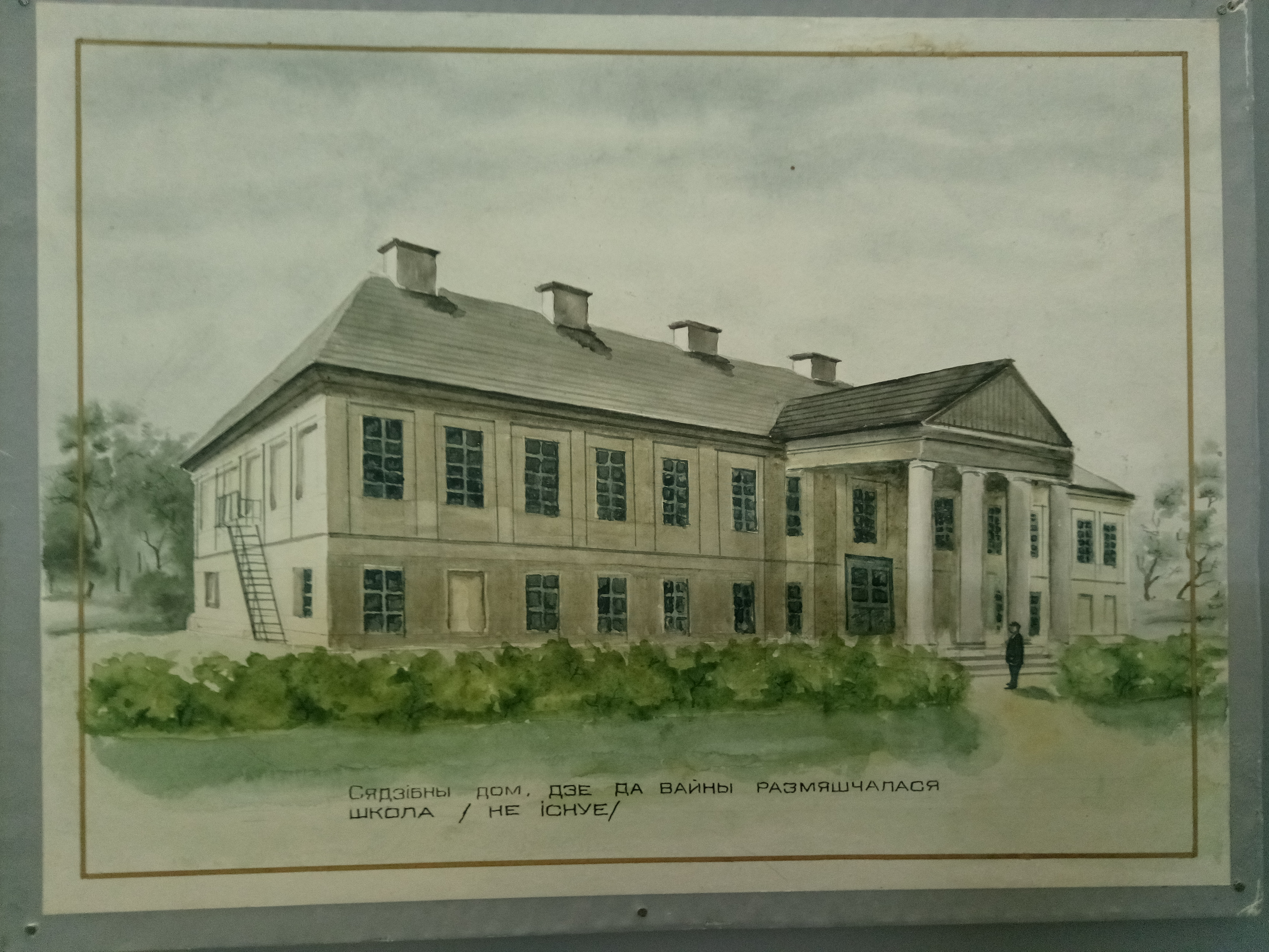 Пухавіцкі раённы краязнаўчы музей. Шацкая сярэдняя школа да Другой Сусветнай вайны.